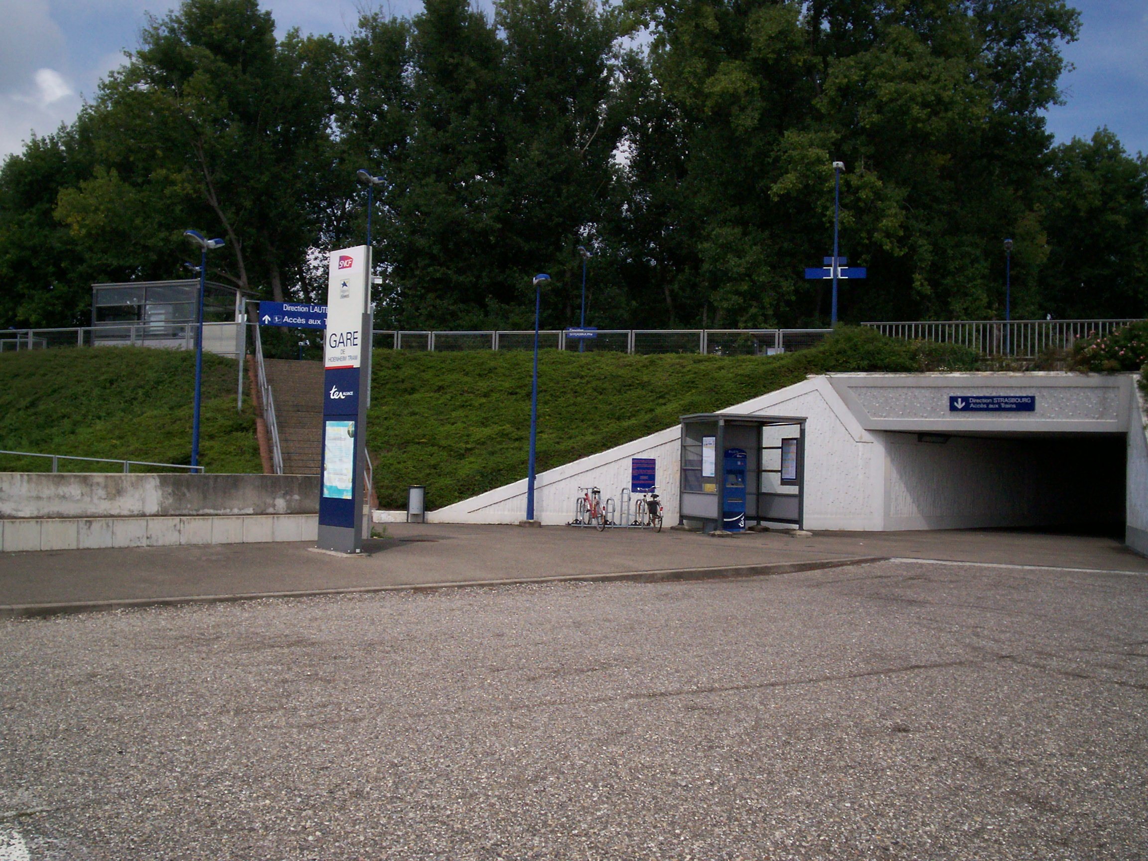 Gare de Hoenheim